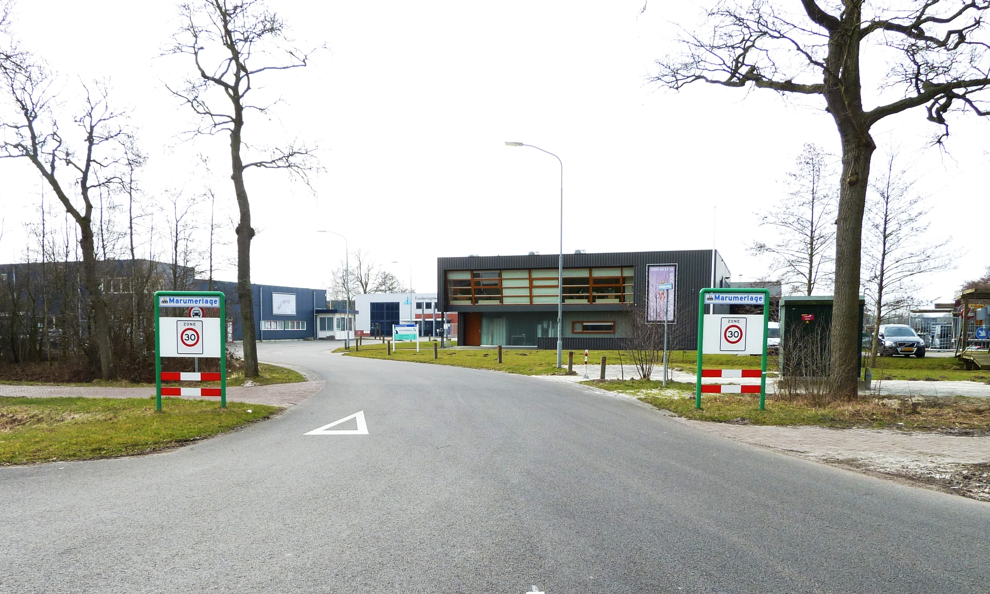 Ingang naar bedrijventerrein Marumerlage bij het dorp Marum (Groningen, Nederland).